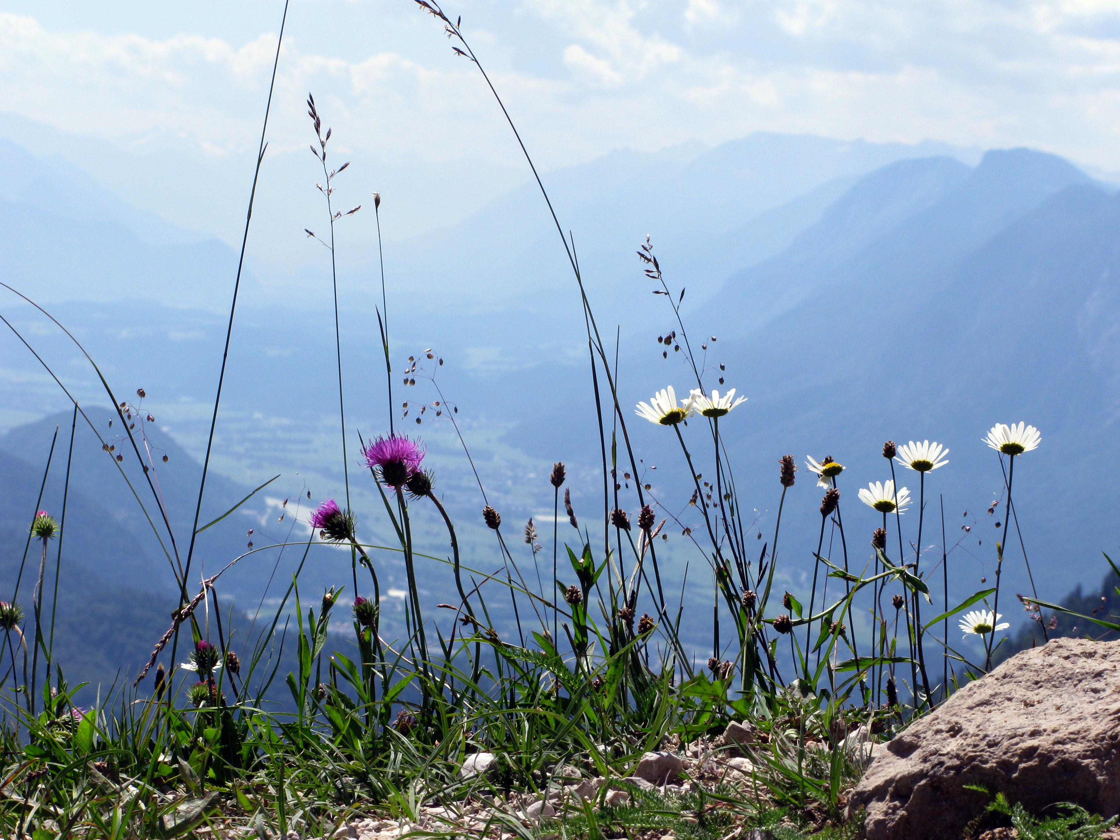 Magerweide in der Umgebung des Alpenpflanzengartens Vorderkaiserfelden